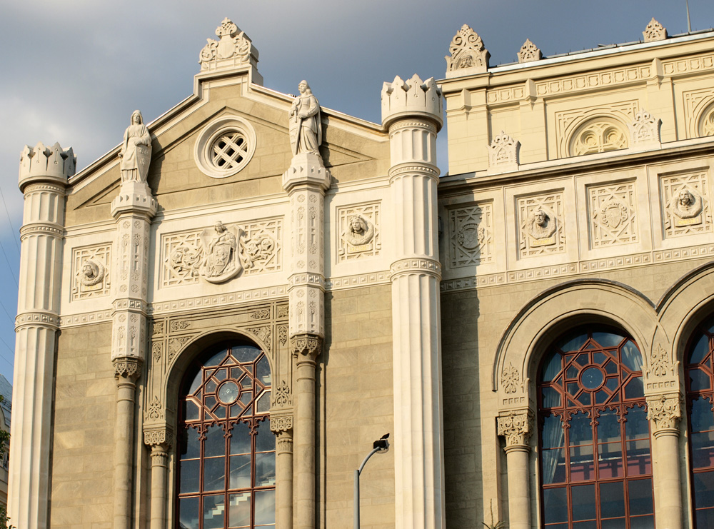 Pesti Vigadó, Budapest, V.ker., pesti Dunapart. A Pesti Vigadó felső párkányának fejszobrai. Marschalkó János, 1865. Ez a sorozat 14 darabot számlál, 10 fej a főhomlokzat, 2-2 fej pedig az északi és déli oldalhomlokzat párkányán kapott helyet. Térbeli elhelyezkedés szerint, balról jobbra haladva a következőképpen: Luxemburgi Zsigmond, Mária Terézia, IV. Béla, Árpádházi Szent Erzsébet, Széchenyi István, Hunyadi János, Nagy Lajos, Mátyás, Zrínyi Miklós, József nádor, Szilágyi Erzsébet, Vabula J., Árpád, Attila. (a képen)